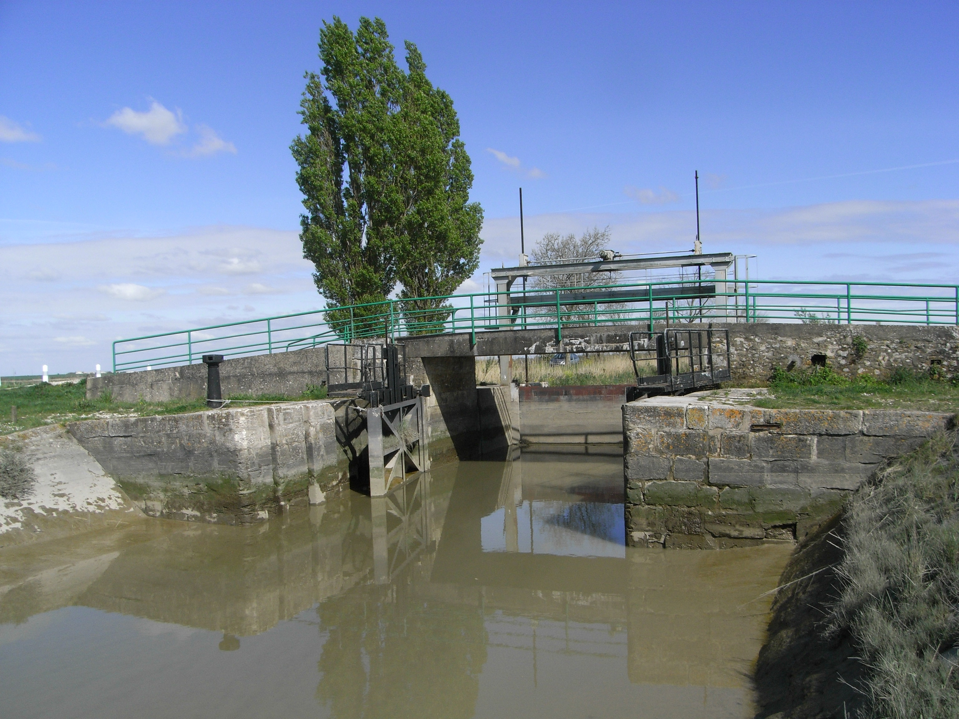 L'écluse du canal de Brouage en Charente-Maritime (France). Au premier plan, le Havre de Brouage (le niveau du chenal varie selon la marée)